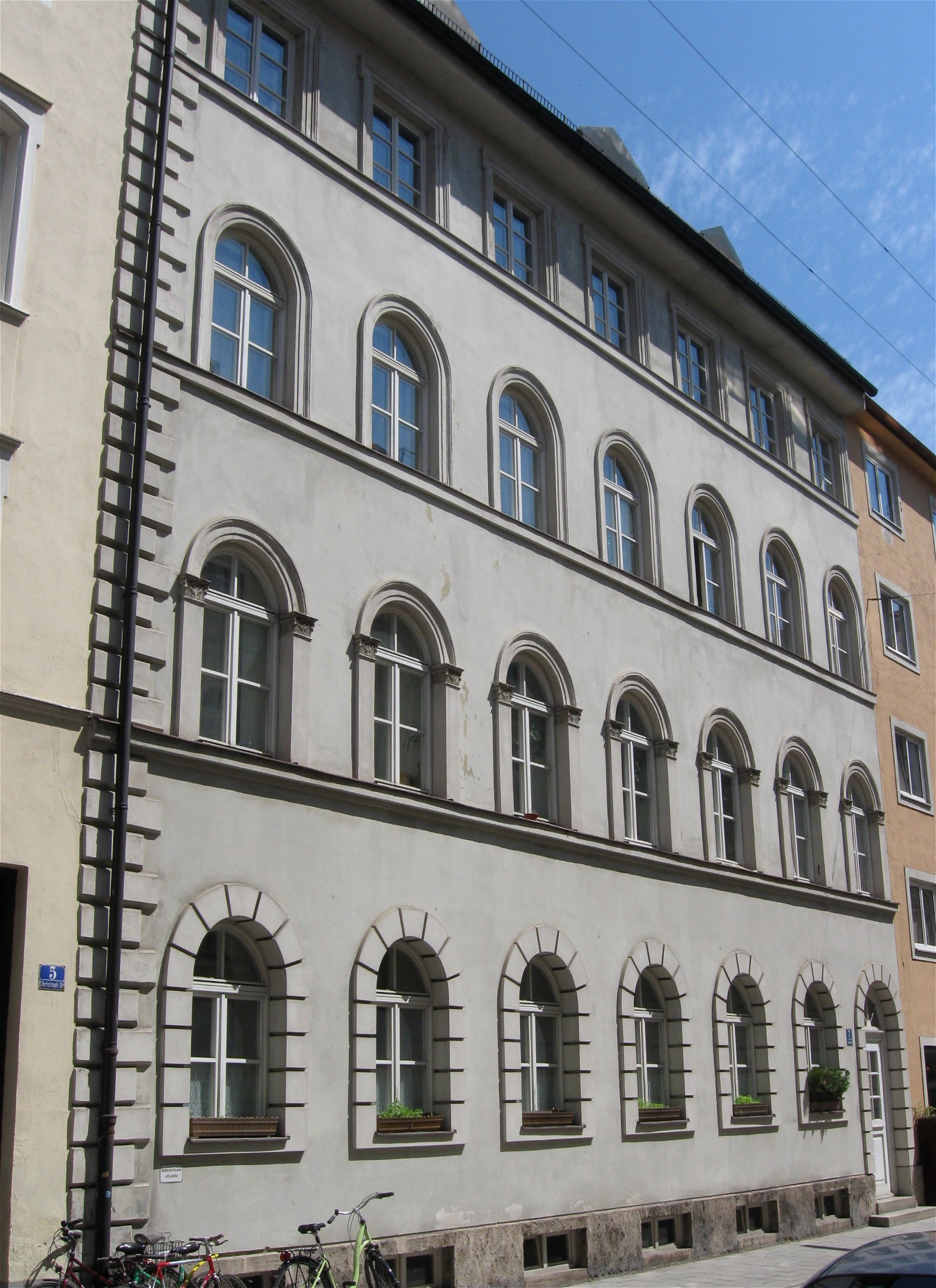 Christophstraße 7; Mietshaus, klassizistisch, in der Art Klenzes, um 1829-30 von Joseph Höchl.